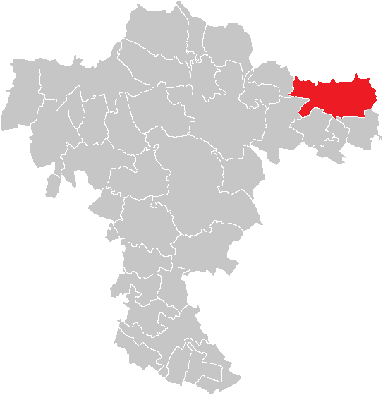 Bezirk Mistelbach